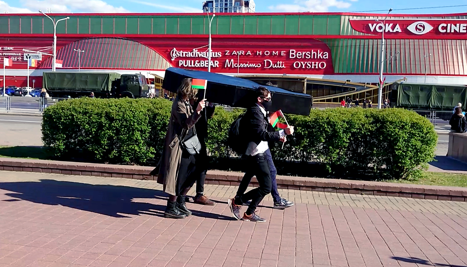 За гэтую акцыю Данік Лаўрэцкі і Лізавета Пракопчык былі пакараныя 18 суткамі арышту на дваіх.